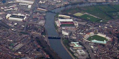 Helikopterfoto över Nottingham.City Ground, Trent Bridge Ground och Meadow Lane syns.